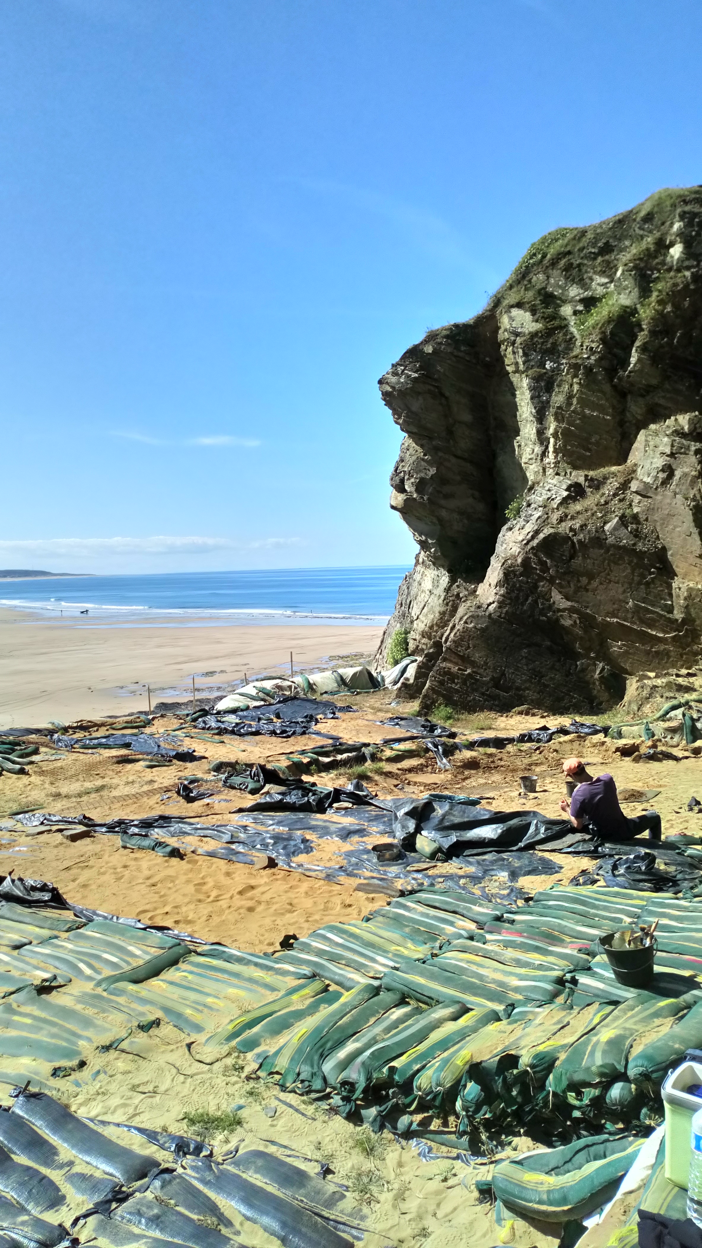 Site paléolithique du Rozel : le chantier de fouilles en 2020.